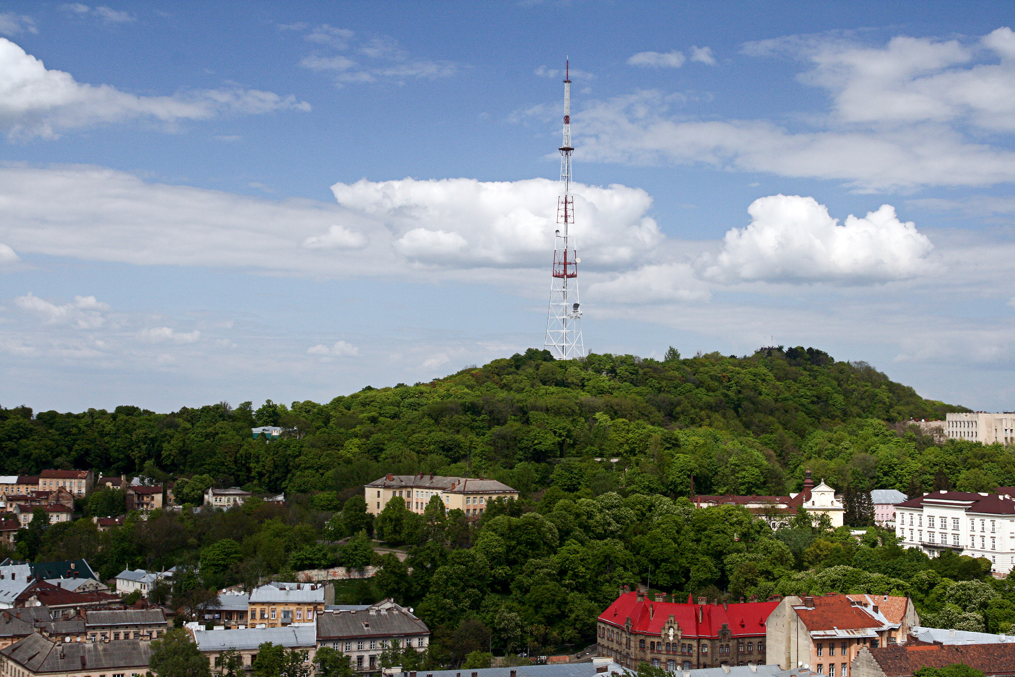 Lviv-140. Парк «Високий Замок», м. Львів. Львівський міський виробничий трест зеленого господарства, 35,5 га. 49°50′53.16″ пн. ш. 24°02′21.12″ сх. д. Парк — пам’ятка садово-паркового мистецтва.